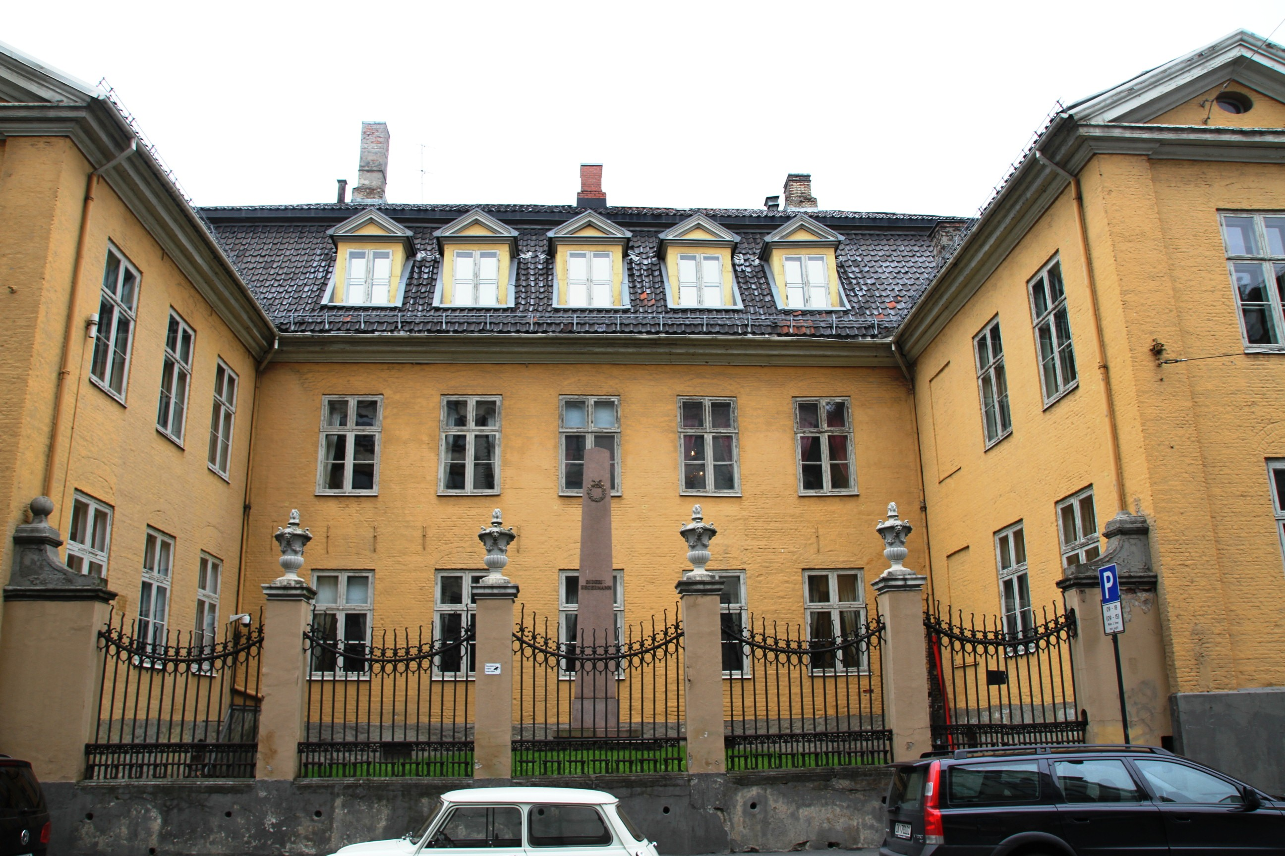 Den gamle krigsskolen i Tollbugata, Oslo. I forgrunnen minnesmerket over Diderich Hegermann.